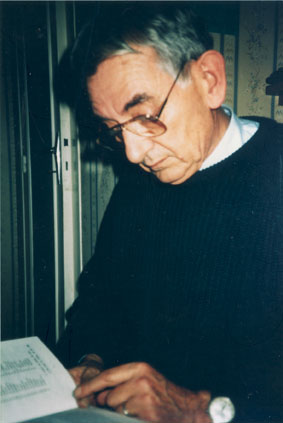 Michel Grosclaude vers les années 2000